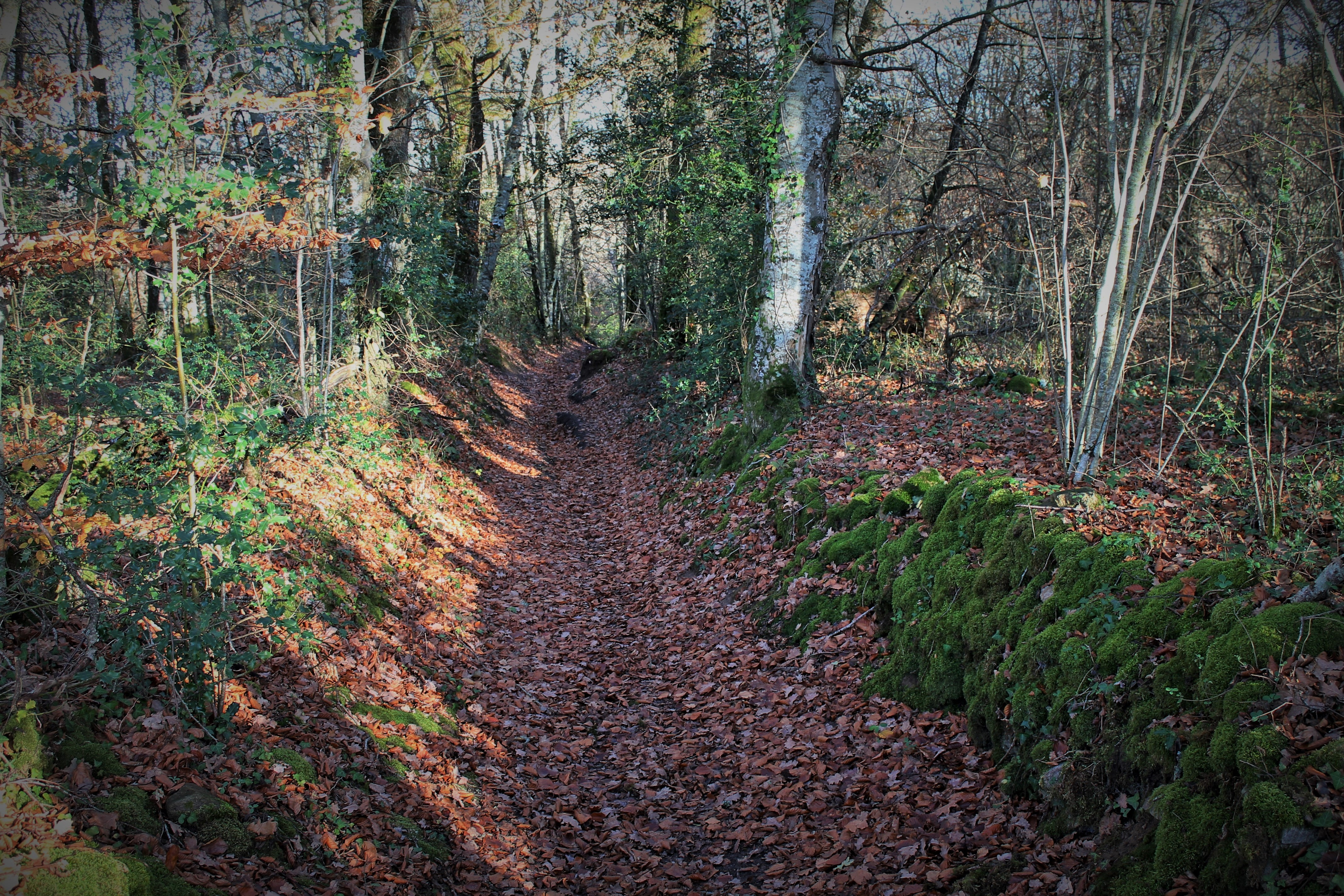 Dans la commune de Jouillat au lieu-dit de Villemorle, l'ancien chemin emprunté par les migrants maçons pour rejoindre la région parisienne.